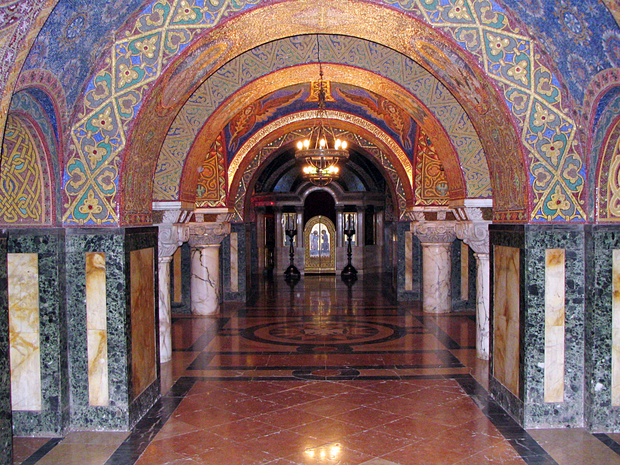 Крипта цркве Светог Ђорђа на Опленцу (фото: Михаило Грбић, 21.10.2006.)